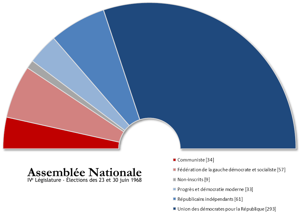 Assemblée Nationale française issue des élections de juin 1968